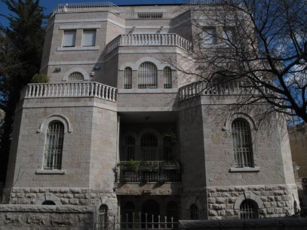 Jérusalem - Maison dans le quartier de Talbia.